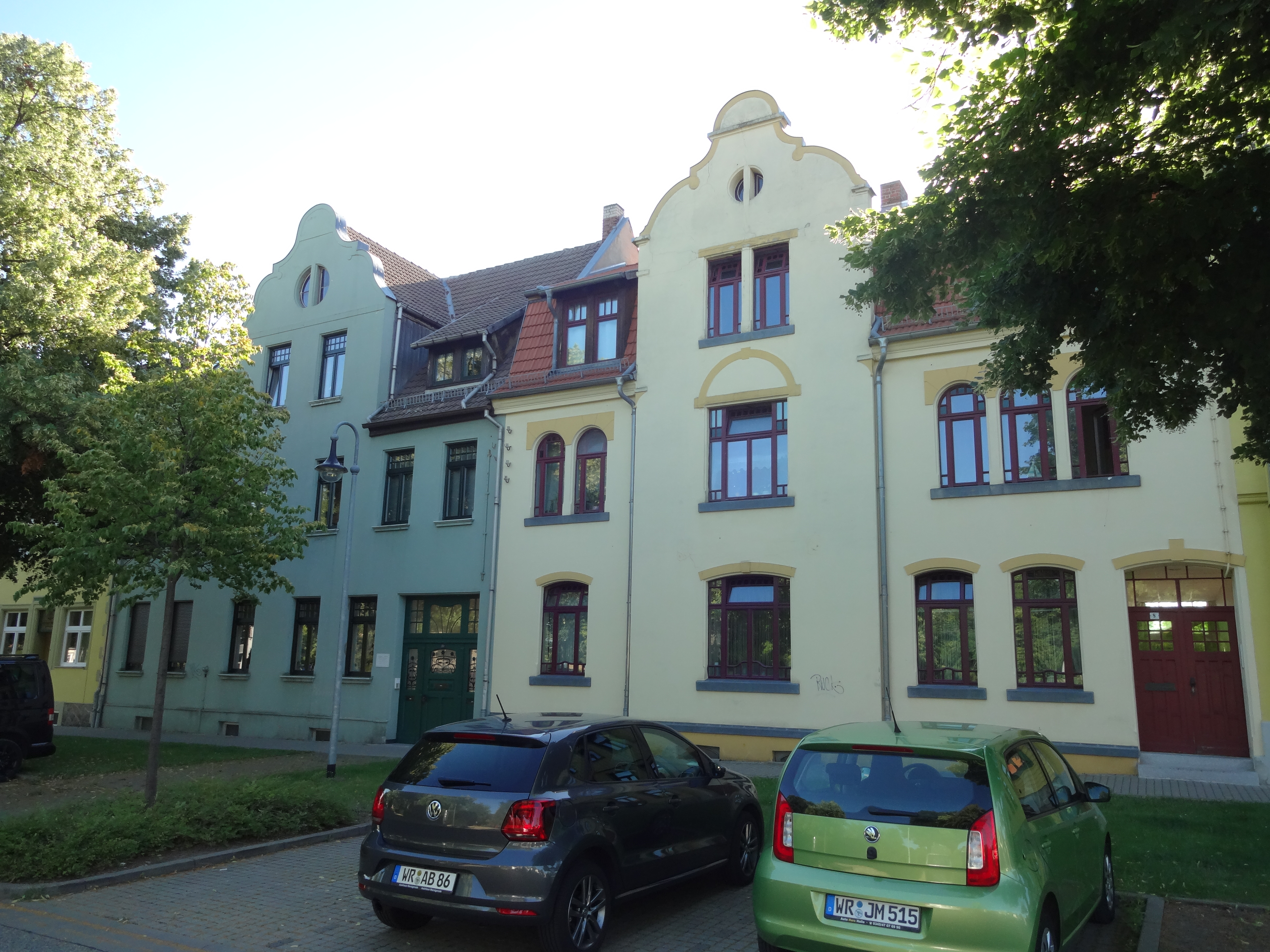 ehemals denkmalgeschützte Häusergruppe Schmatzfelder Straße 8, 10 in Wernigerode